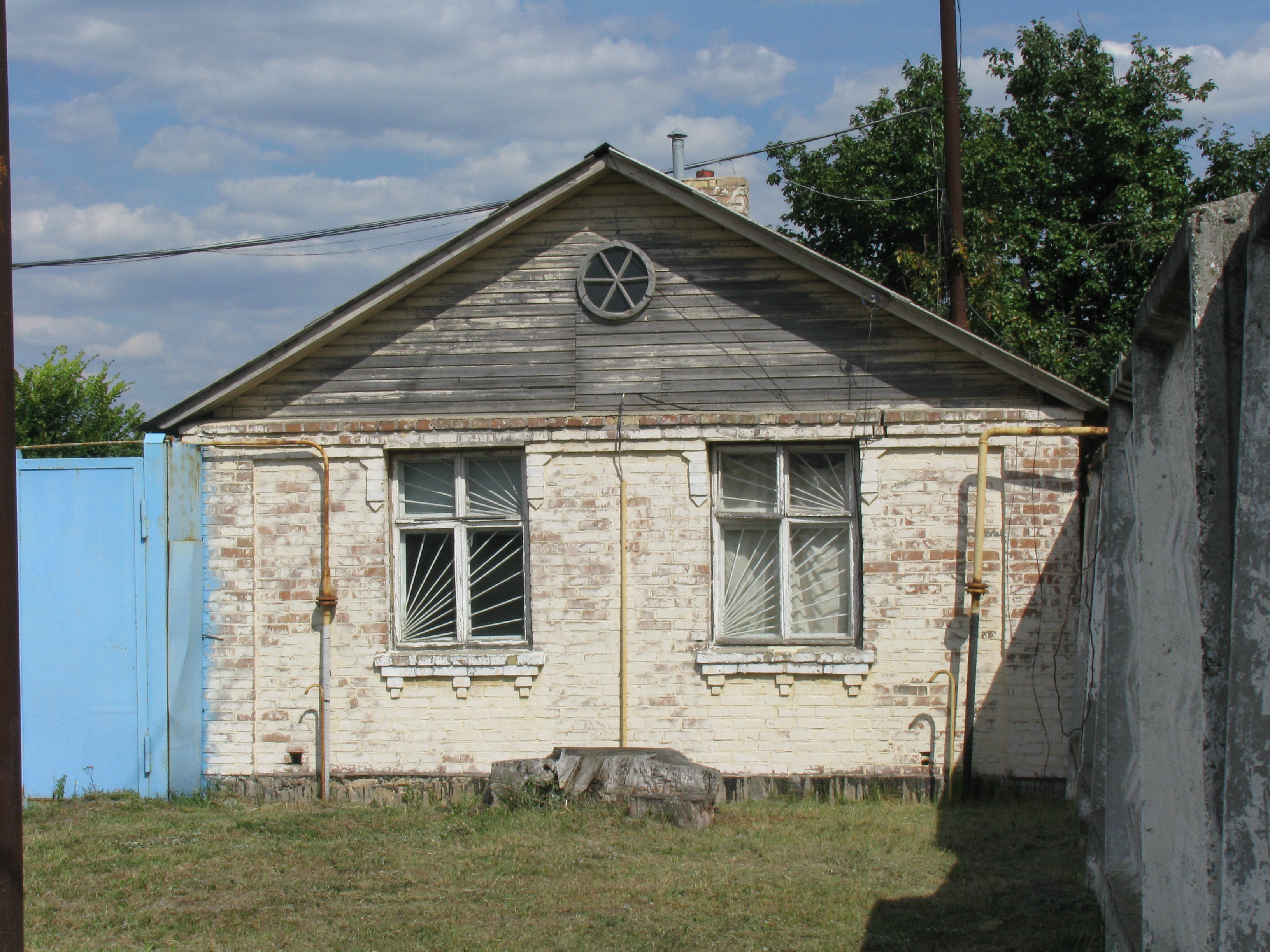 Поштова станція, с.Гурівщина